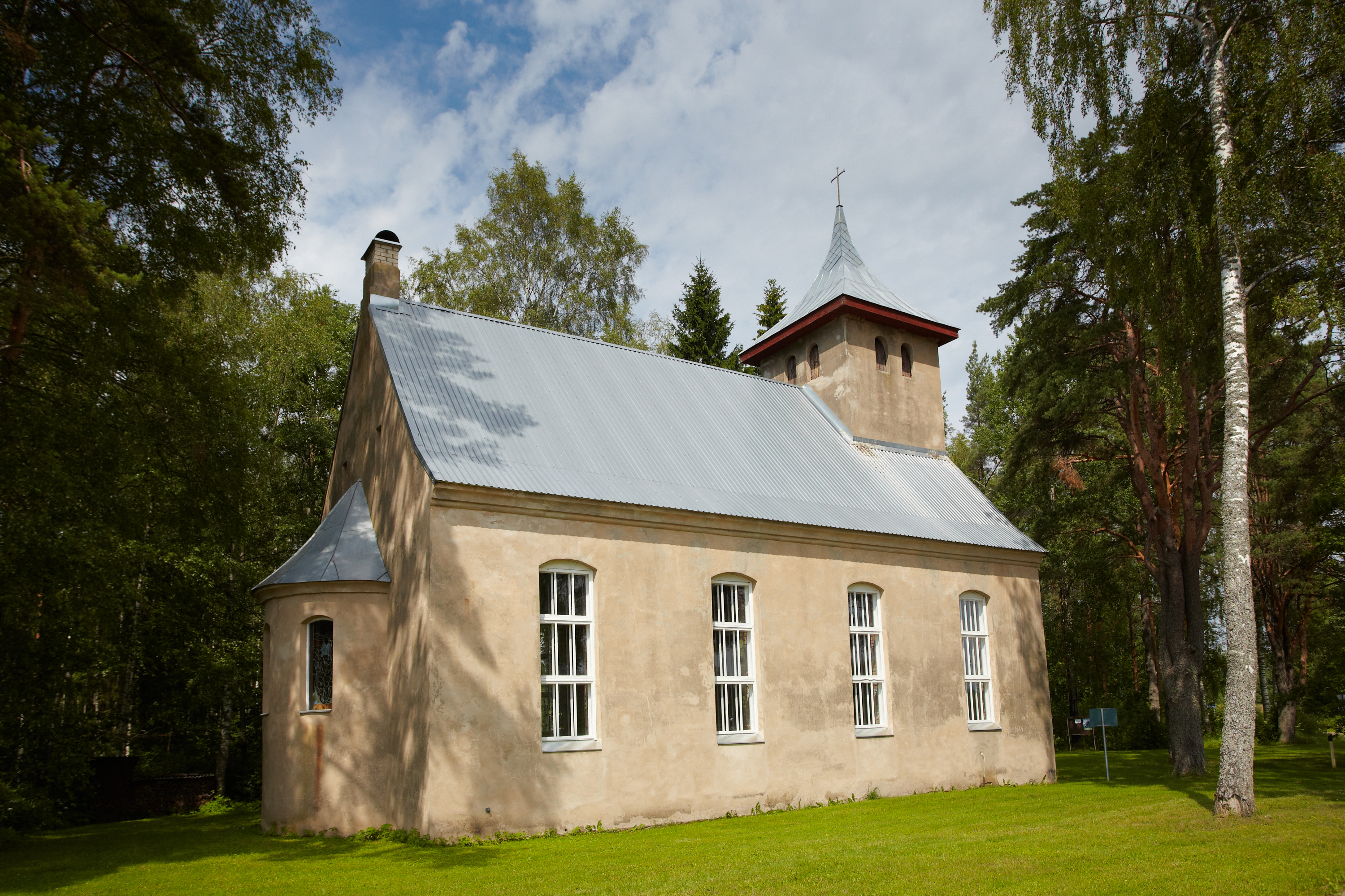 Heimtali Peetri kirik Võrumaal Sõmerpalu vallas 2012. aasta juulis